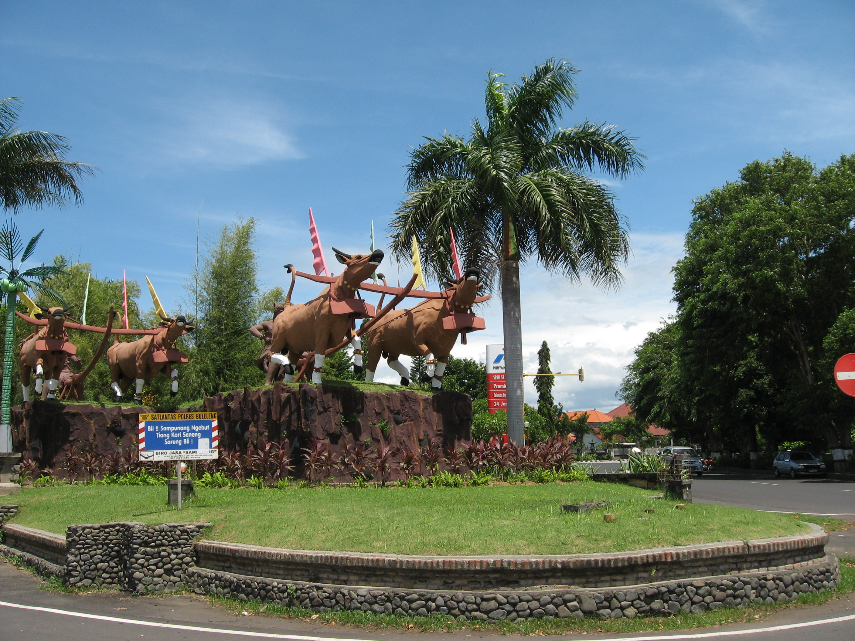 Singaraja Momument